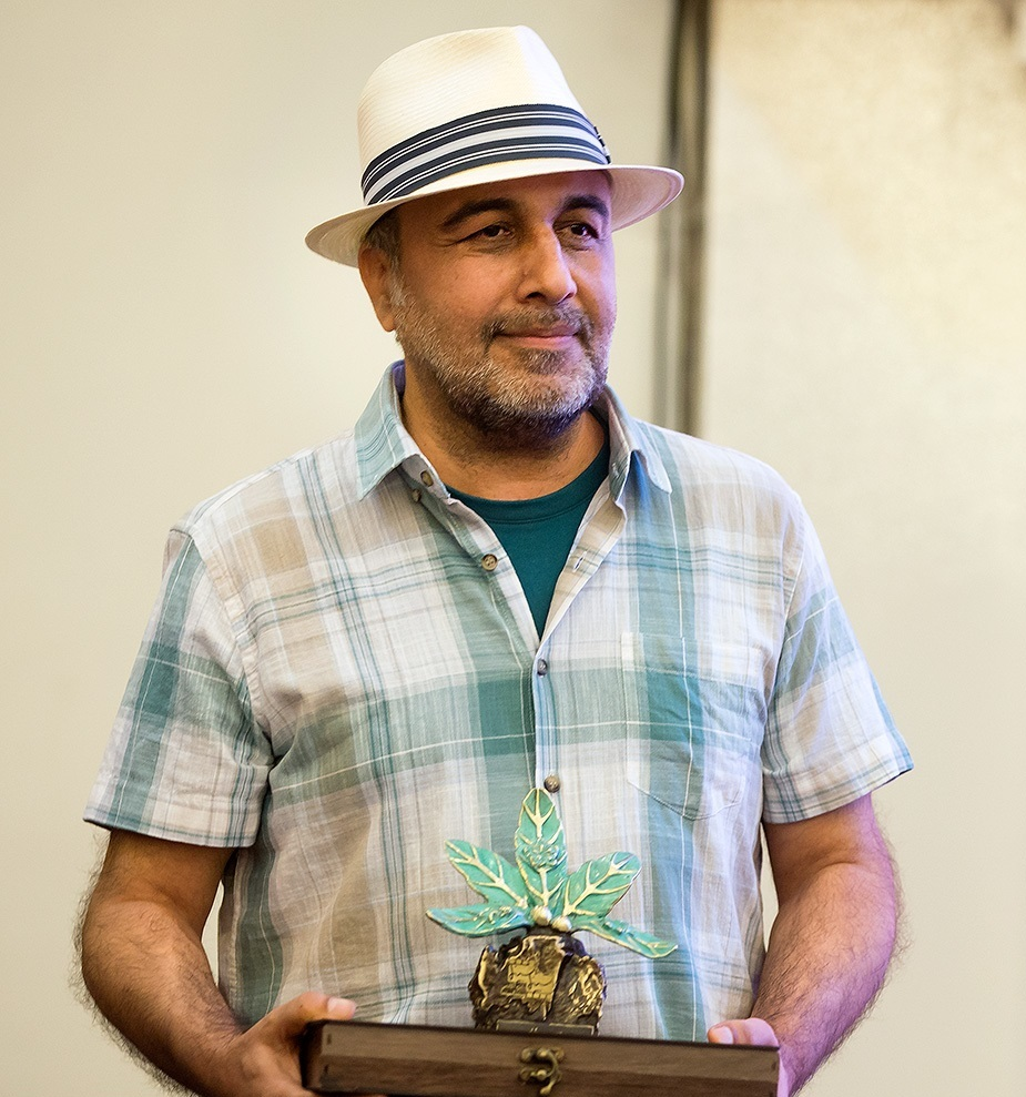 نخستین دوره جایزه «آکادمی سینما سینما» به ریاست کیانوش عیاری